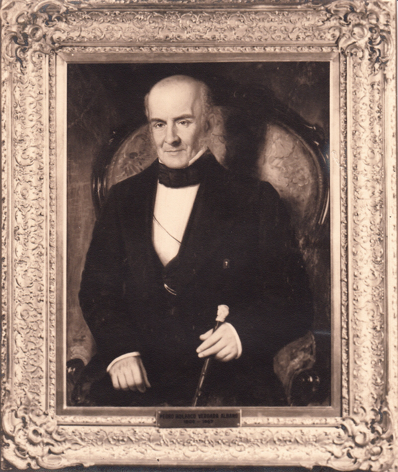 Pedro Nolasco Vergara Albano retratado por Raymond Monvoisin del año 1859 en Santiago de Chile.